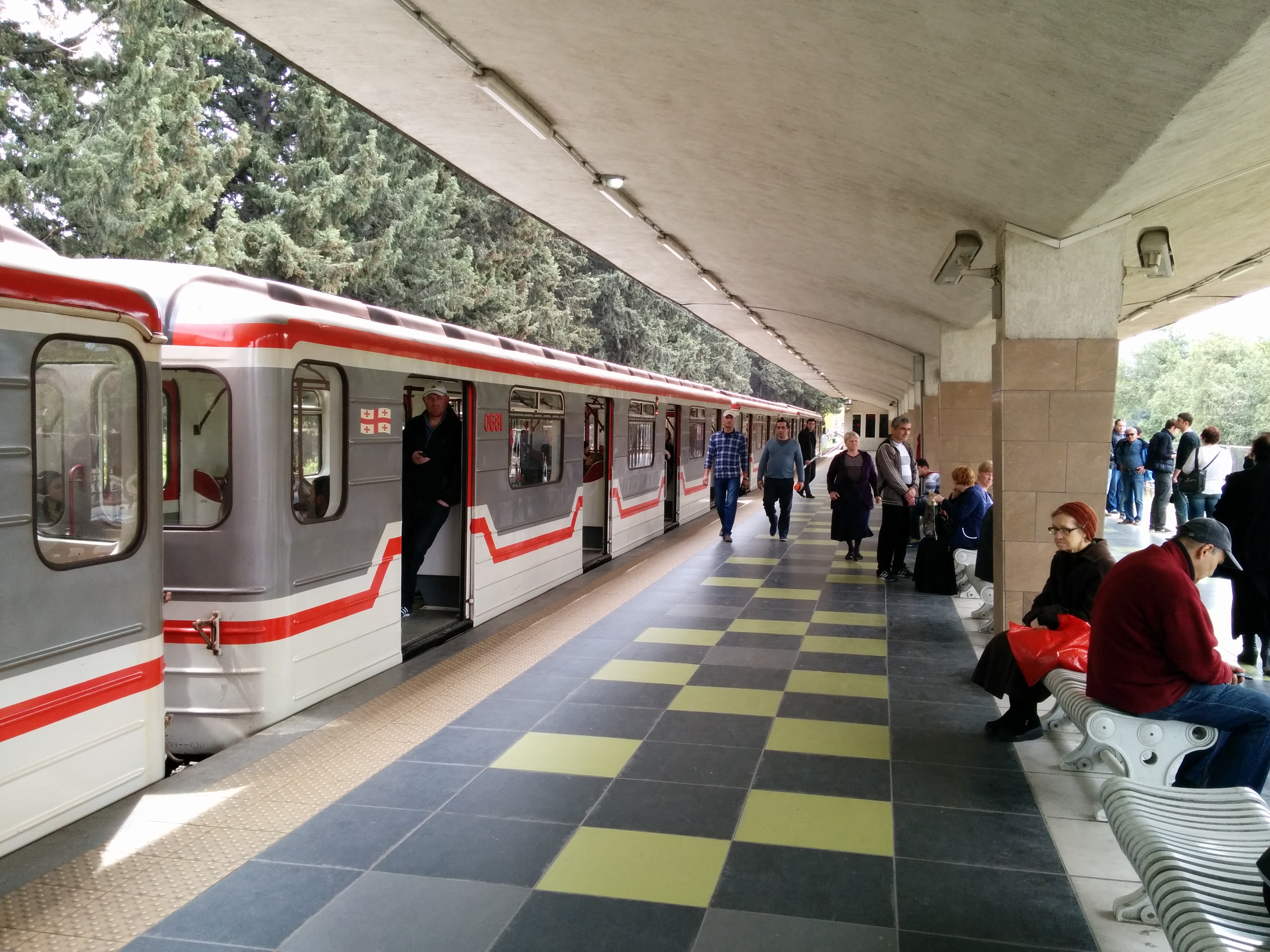 Didube Metro Station, Tbilisi.